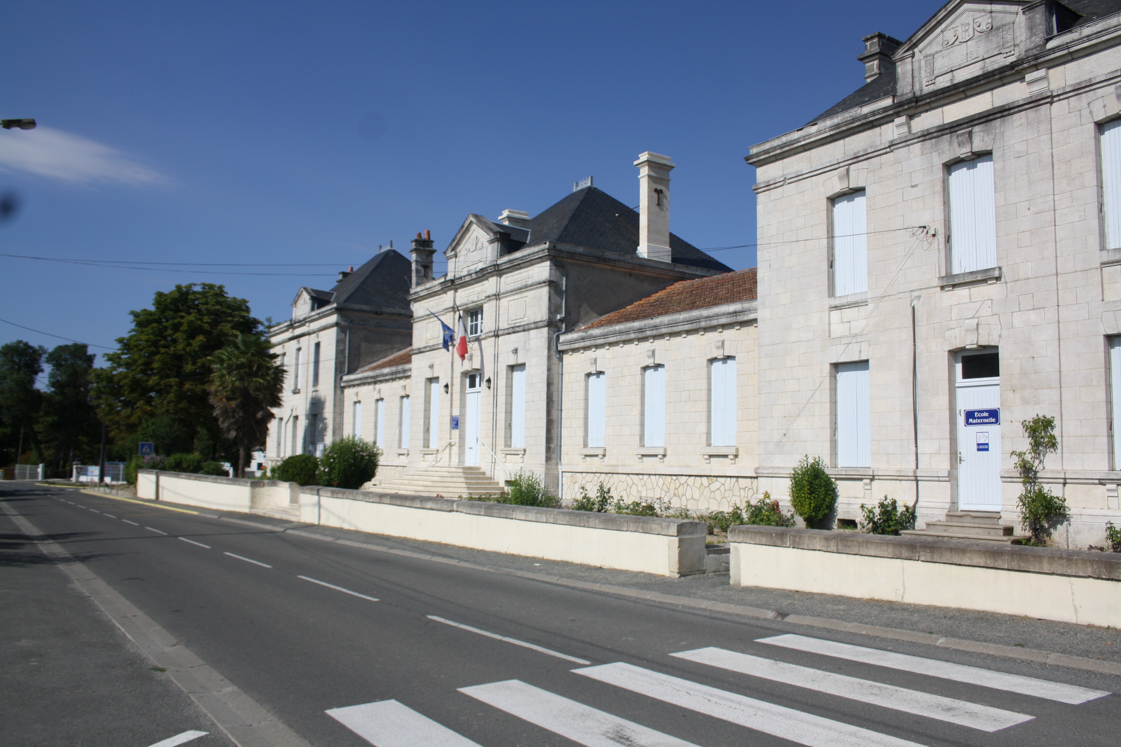 Mairie et école de Varaize